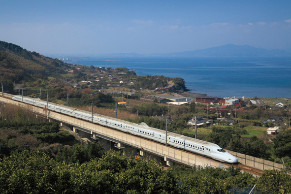 八代海を背にみかん畑を走るN700系